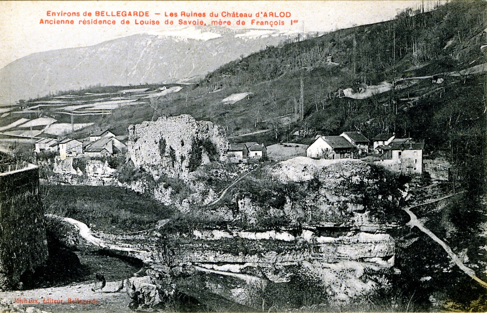 Carte postale ancienne du château d' Arlod avant la création du barrage de Barrage de Génissiat sur le Rhône en 1948.- Bellegarde-sur-Valserine Ain Auvergne-Rhône-Alpes